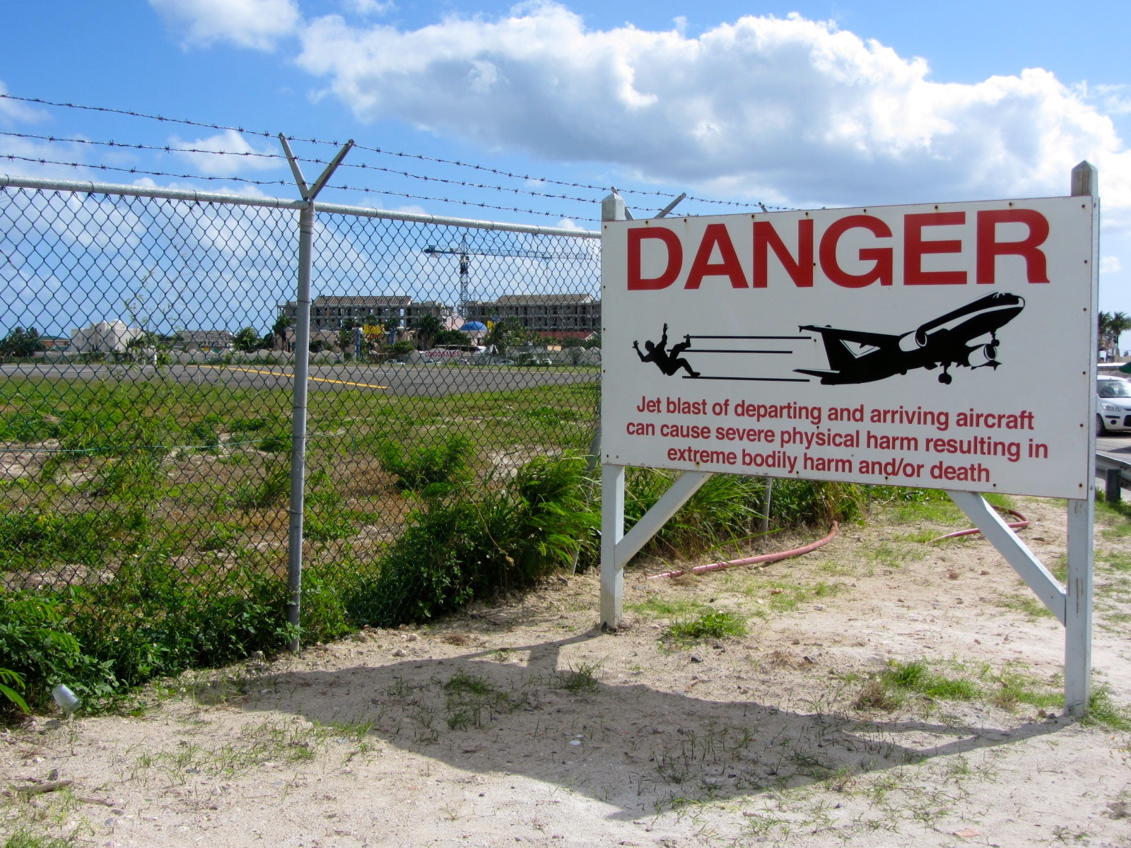 Airport Danger Jet Blast Sign